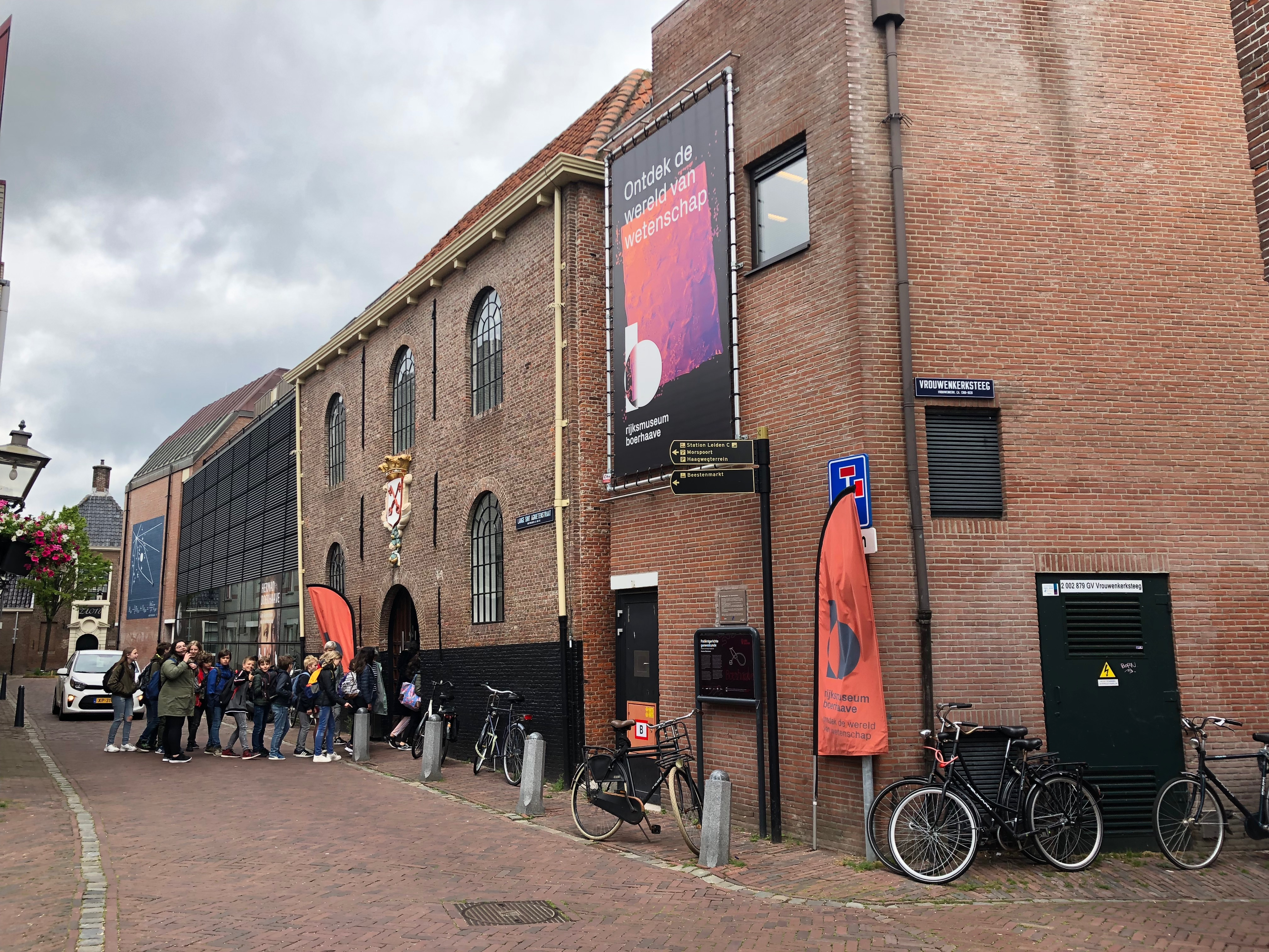 Rijksmuseum Boerhaave in 2019